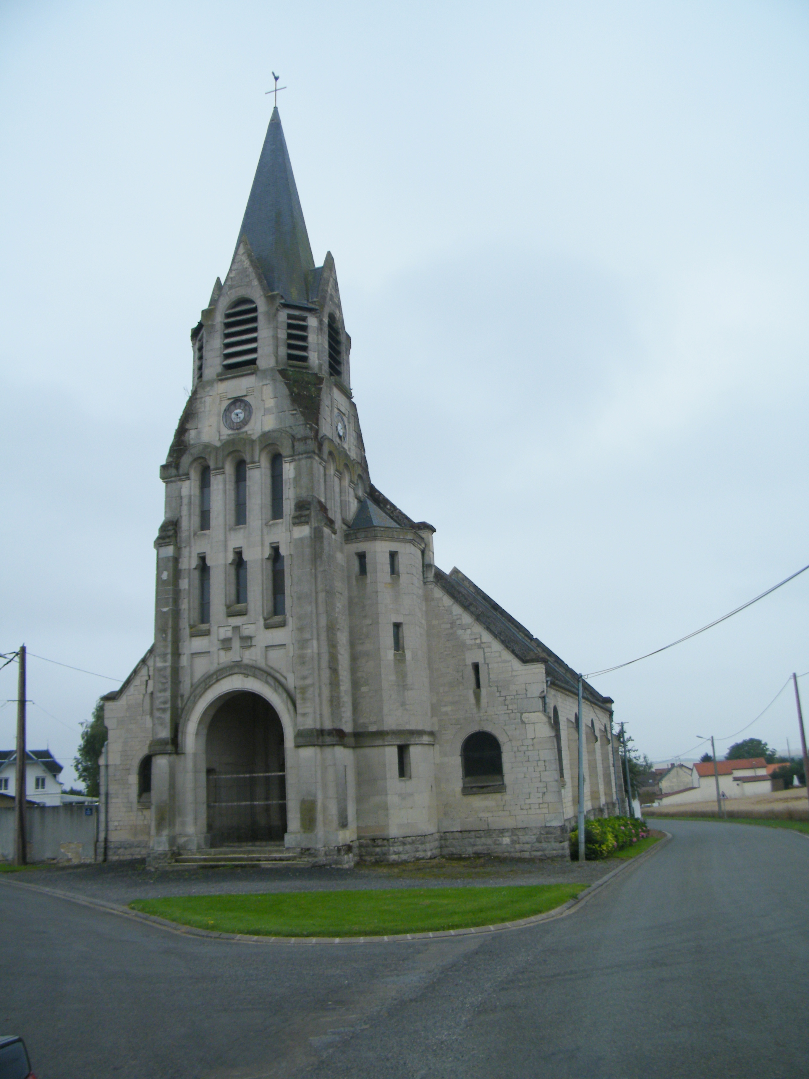 Eglise.